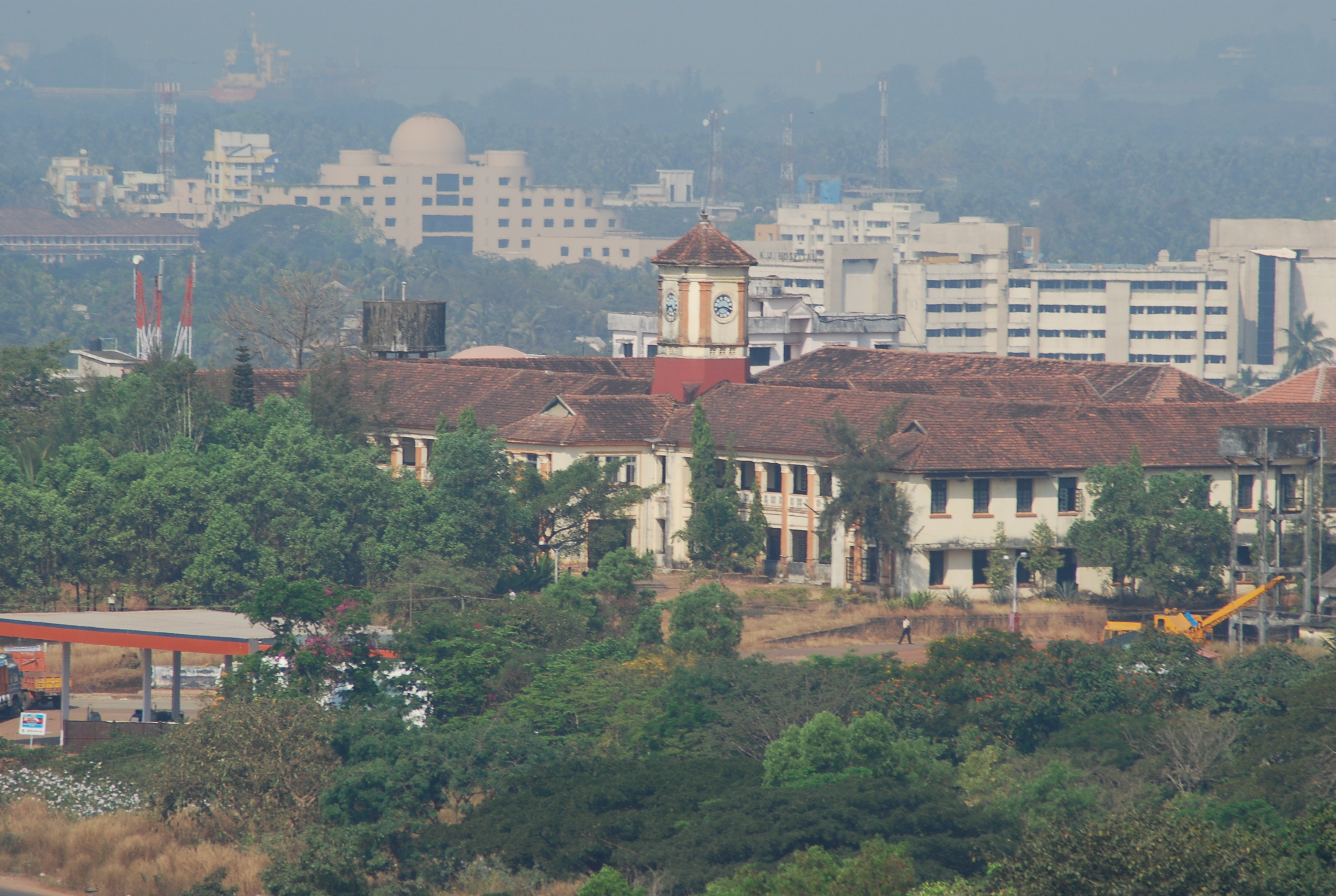 Karnataka Polytechnic, Mangalore